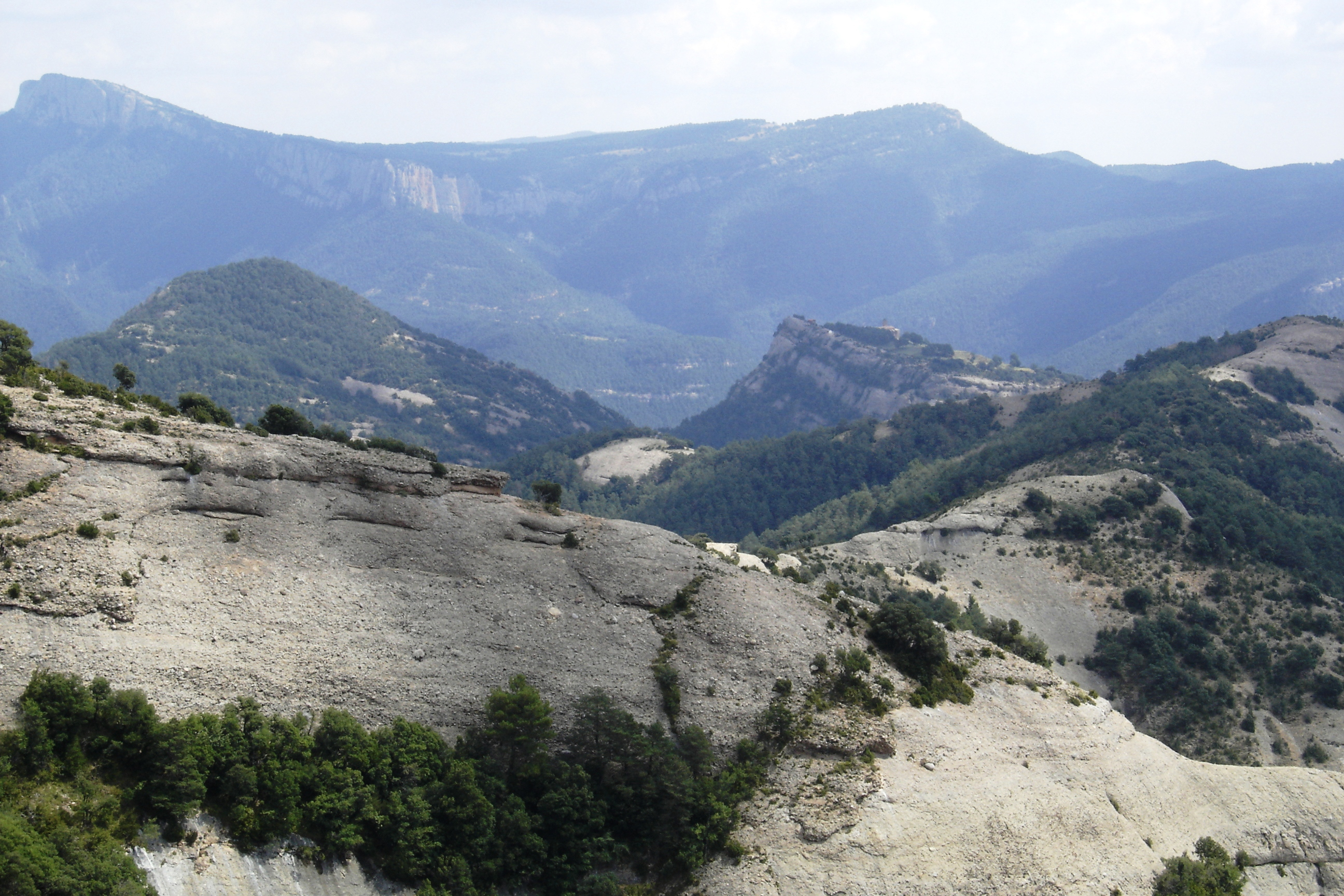 Al fons, el Pla de Busa (Navès, Solsonès) vist des de l'oest. Sota la part central del Pla de Busa, la Rasa de les Cases de Posada. A la banda esquerra de la part central de la foto, el vessant occidental del Tossal de Vall-llonga (Navès i Sant Llorenç de Morunys, Vall de Lord). A la banda dreta de la part central de la foto, la banda oest de la Mola de Lord (Sant Llorenç de Morunys, Vall de Lord). En primer terme, una porció de la Serra Llarga de Sòbol (Guixers, Vall de Lord). This is a a photo of a natural area in Catalonia, Spain, with id: ES510197